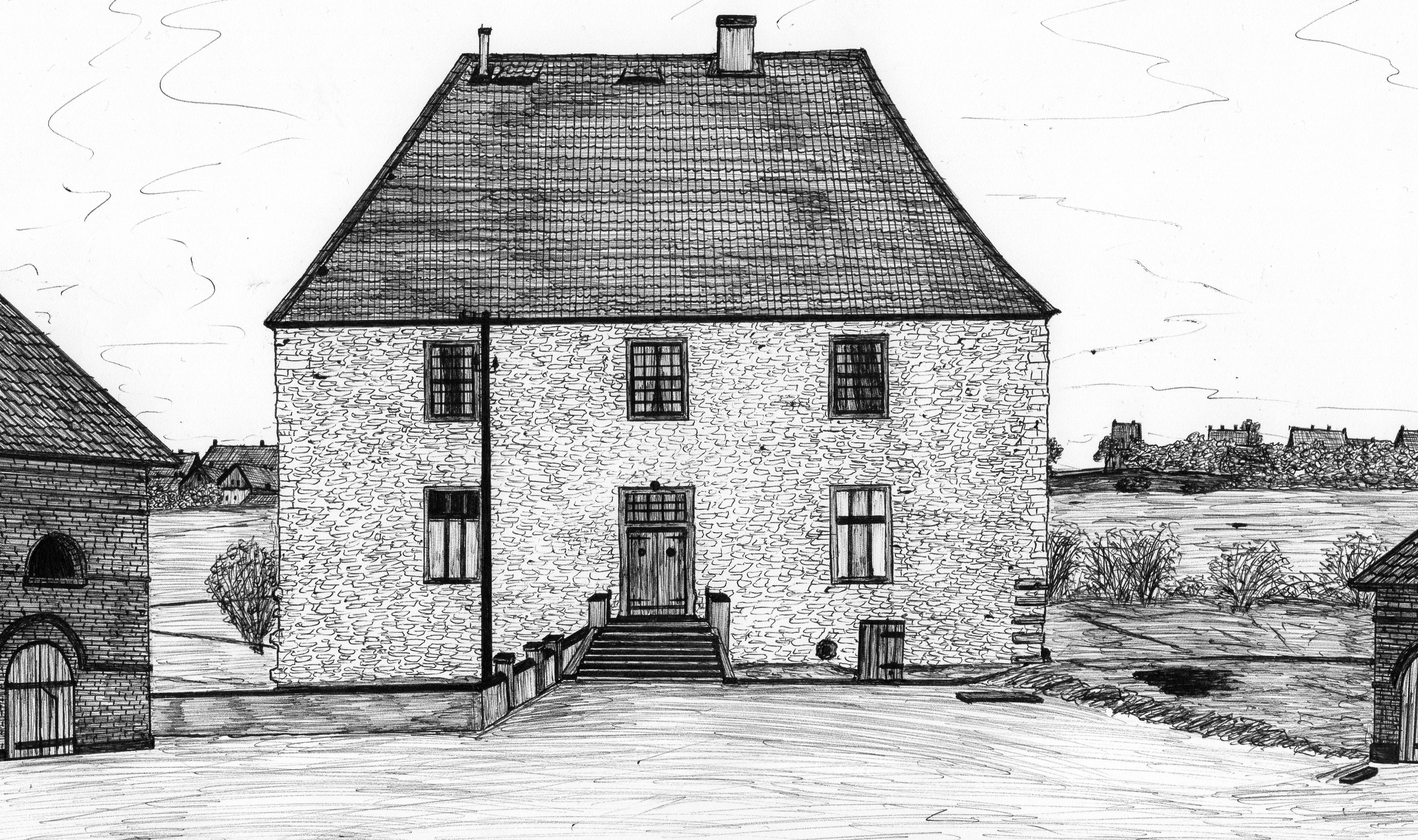 Das Wasserschloss Haus Heithoff. Abgerissen 1972-1973.